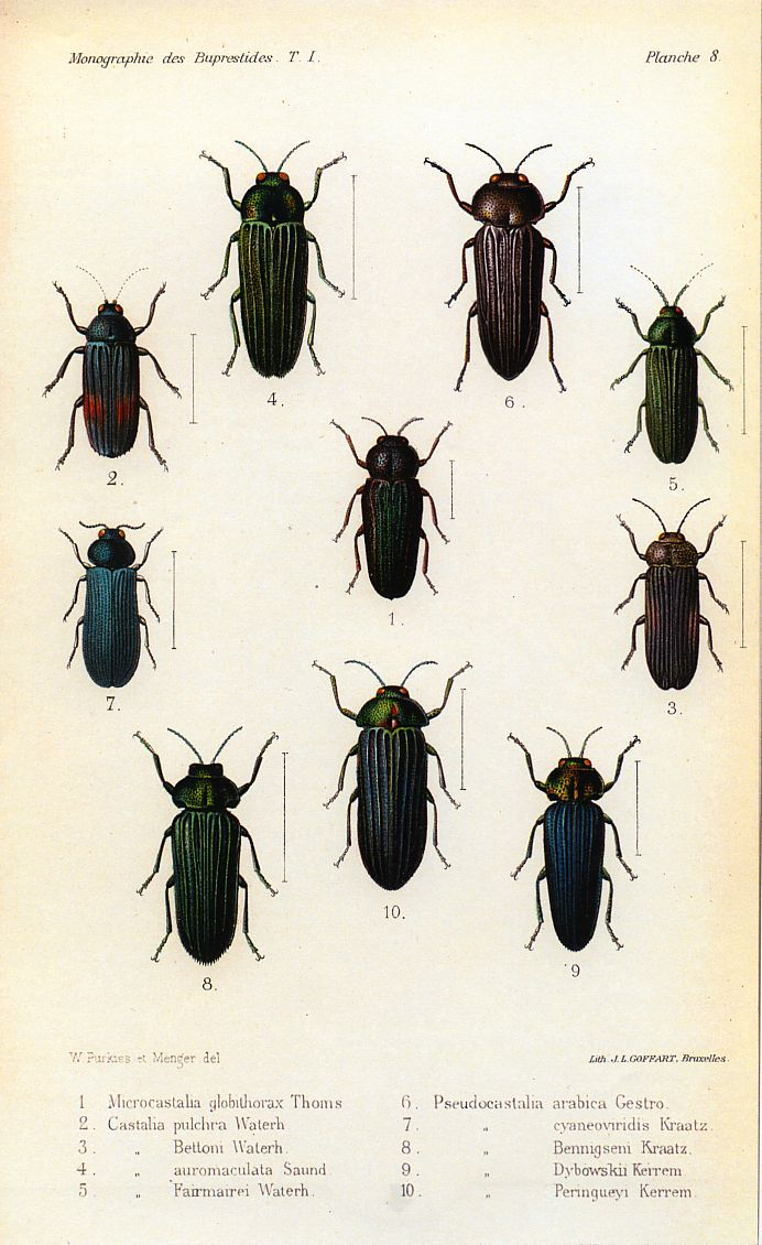 Microcastalia globithorax Thoms. = Microcastalia globithorax (Thomson, 1878) Castalia pulchra Waterh. = Strigoptera pulchra (Waterhouse, 1904) Castalia Bettoni Waterh. = Paracastalia bettoni Waterhouse, 1904 Castalia auromaculata Saund. = Strigoptera auromaculata (Saunders, 1867) Castalia Fairmairei Waterh. = Strigoptera fairmairei (Waterhouse, 1904) Pseudocastalia arabica Gestro. = Pseudocastalia arabica (Gestro, 1877) Pseudocastalia cyaneoviridis Kraatz. = Pseudocastalia bennigseni Kraatz, 1896 Pseudocastalia Bennigseni Kraatz. = Pseudocastalia bennigseni Kraatz, 1896 Pseudocastalia Dybowskii Kerrem. = Pseudocastalia bennigseni dybowskii Kerremans, 1906 Pseudocastalia Peringueyi Kerrem. = Cobosella laesicollis (Fairmaire, 1902)